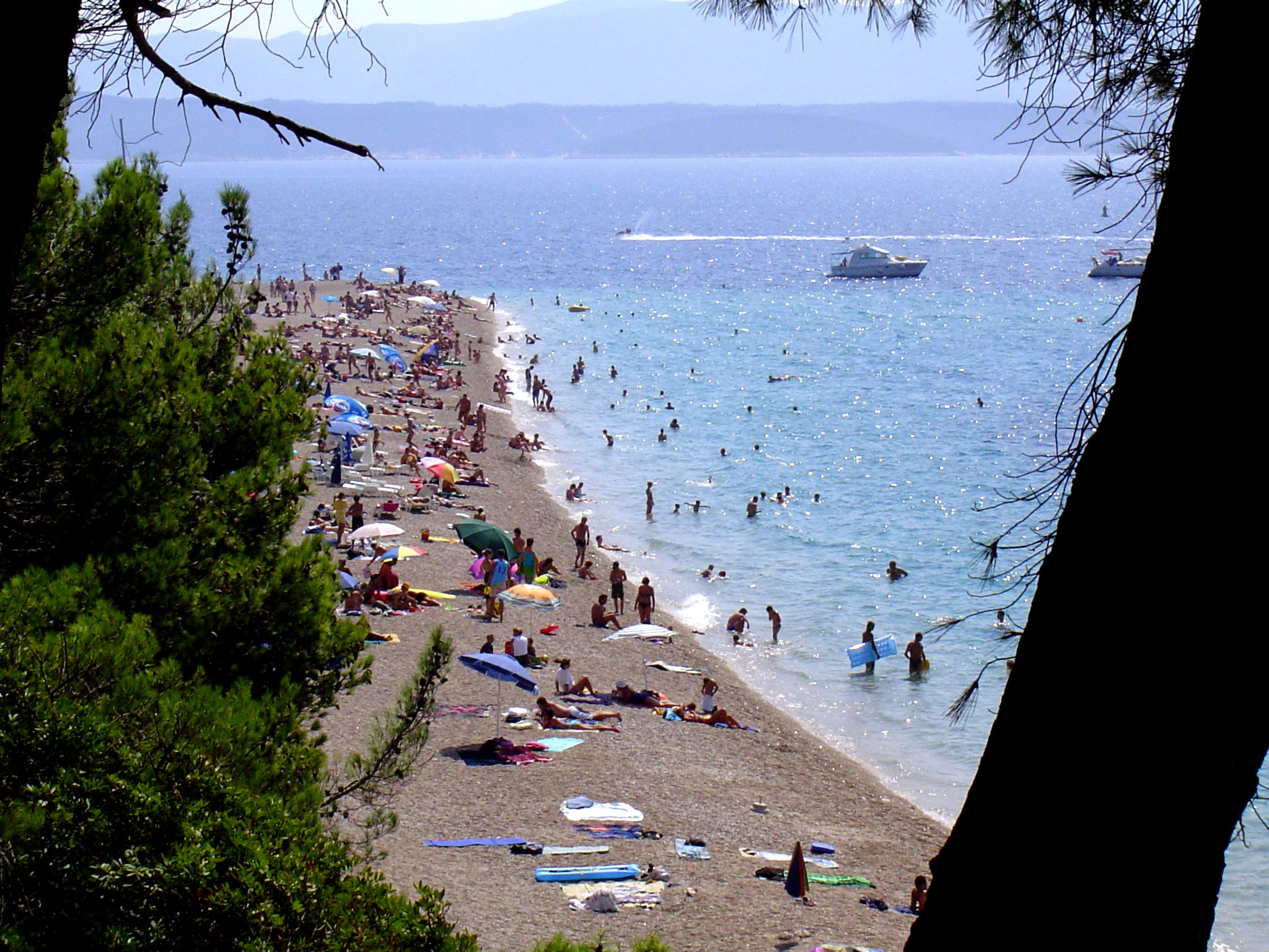 Selbst aufgenommenes Bild